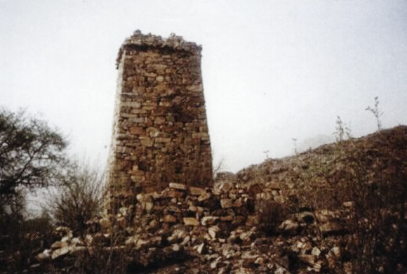 حصون بلاد قبيلة حوالة